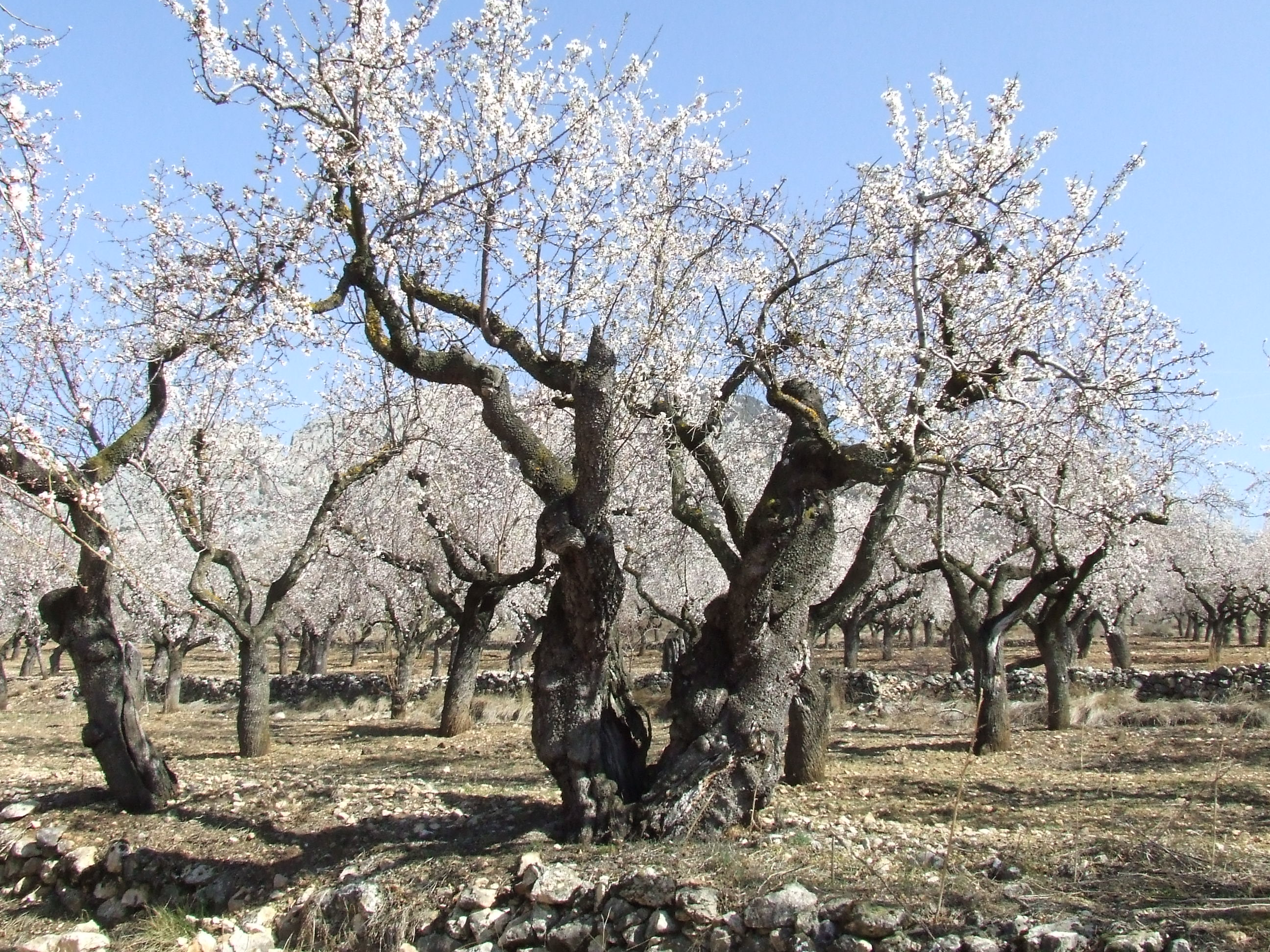 Un ametller (Abella de la Conca, Pallars Jussà)